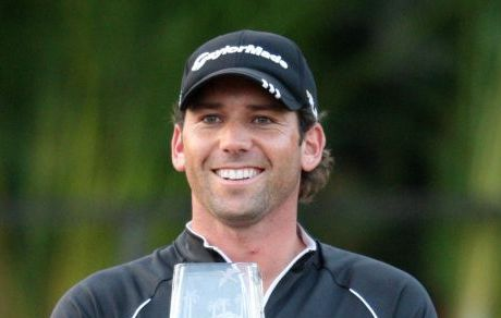 Sergio Garcia, spaans golfprofessional